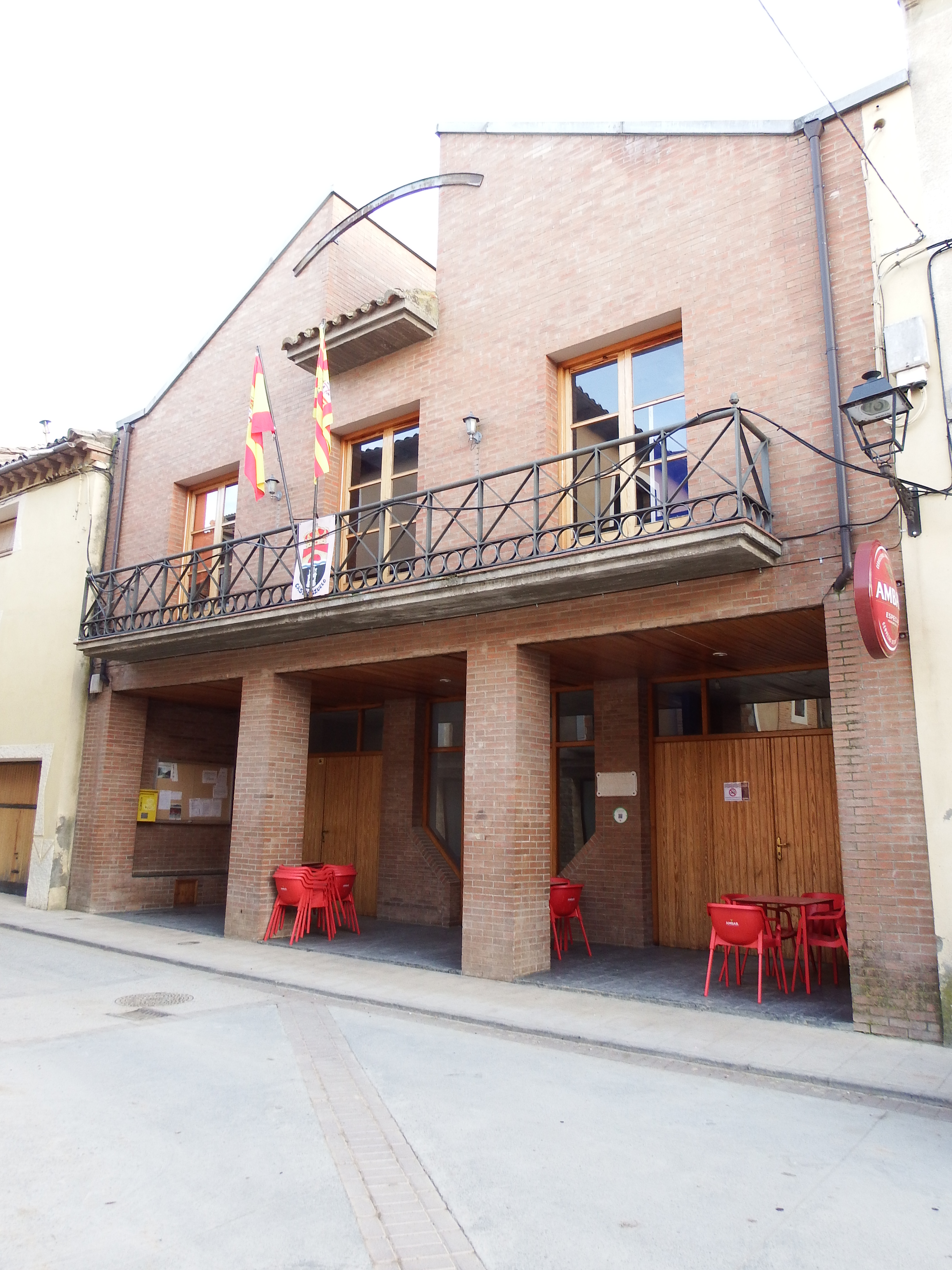 Ayuntamiento de Castillazuelo, Huesca